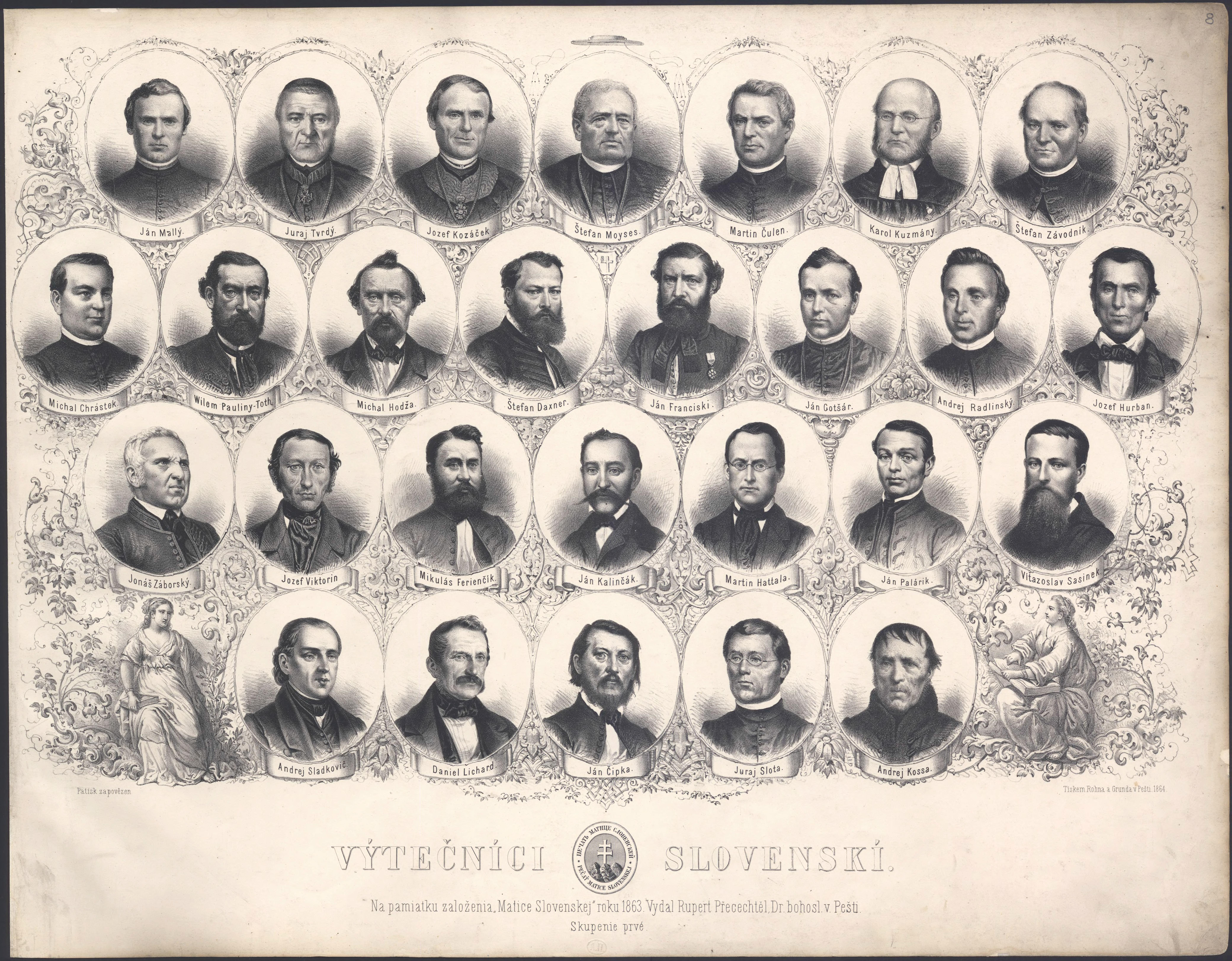 Gallery of famous Slovak people, active in different areas (history, literature, education, religion, science). Published on occasion of establishing Matica slovenská ("Slovak Foundation"), major patriotic organization. List of portraited personalities: Ján Mallý-Dusarov, Juraj Tvrdý, Jozef Kozáček, Štefan Moyzes, Martin Čulen, Karol Kuzmány, Štefan Závodník, Michal Chrástek, Viliam Pauliny-Tóth, Michal Miloslav Hodža, Štefan Marko Daxner, Ján Francisci-Rimavský, Ján Gotčár, Andrej Ľudovít Radlinský, Jozef Miloslav Hurban, Jonáš Záborský, Jozef Karol Viktorin, Mikuláš Štefan Ferienčík, Ján Kalinčiak, Martin Hattala, Ján Palárik, František Víťazoslav Sasinek, Andrej Sládkovič, Daniel Gabriel Lichard, Ján Čipka, Juraj Slota, Andrej Kossa